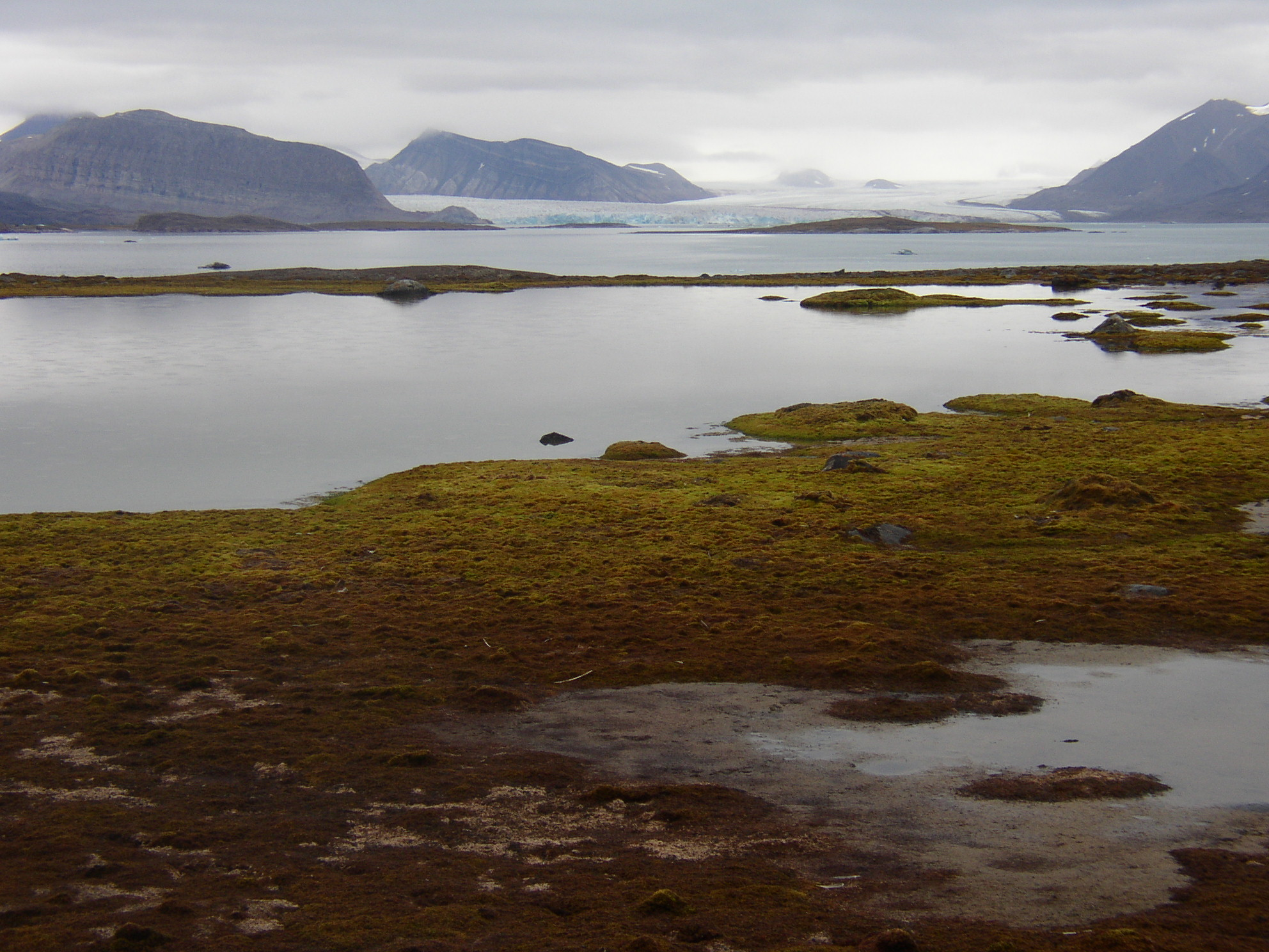 Kongsfjorden from Blomstrandhalvøya, Kongsfjorden, Spitsbergen (Svalbard)